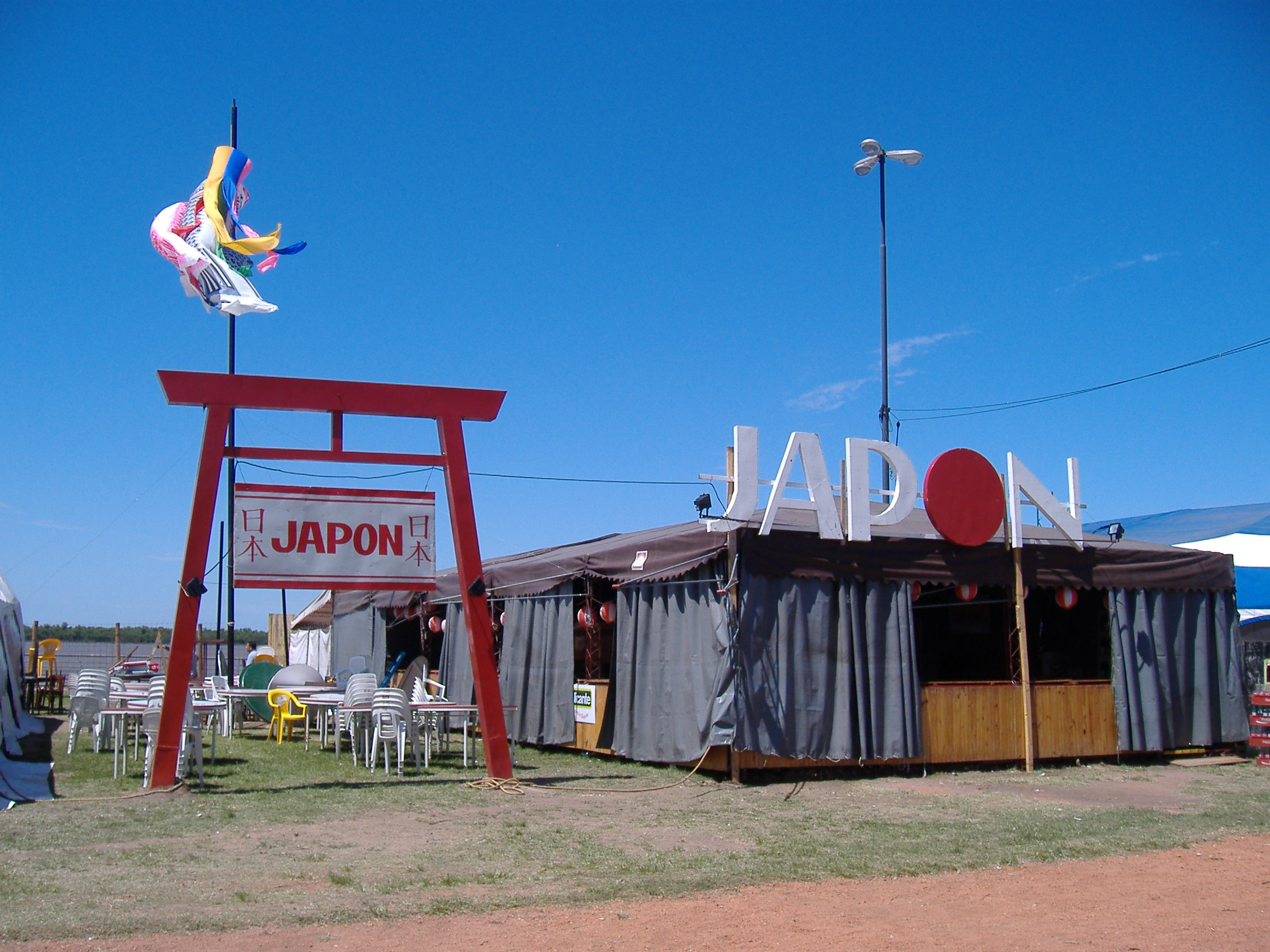 Japan's place at the Encuentro y Fiesta Nacional de Colectividades, Rosario, Argentina.